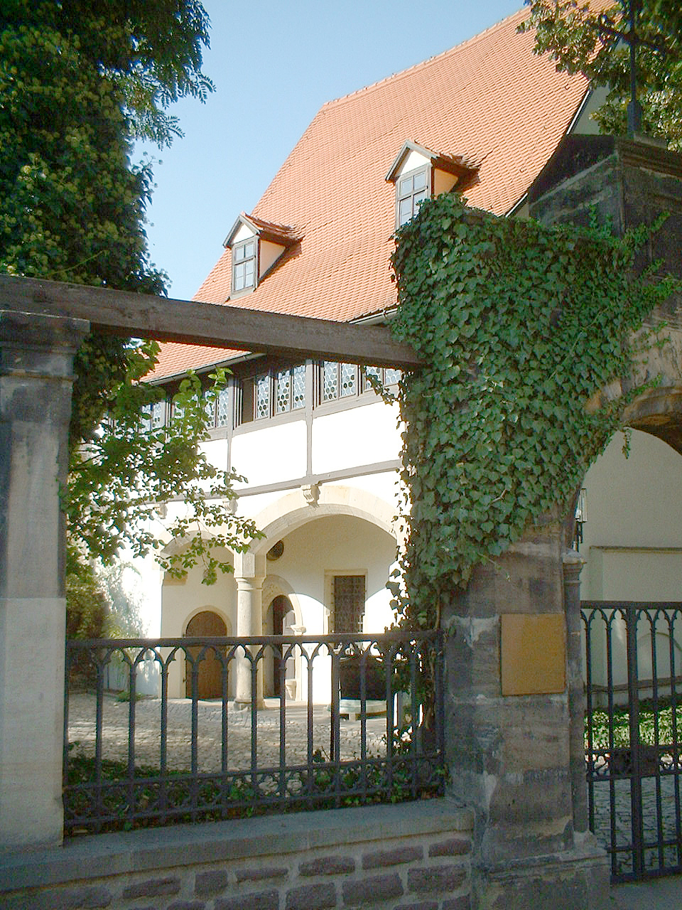 Geburtshaus Martin Luthers in Eisleben, heute ein Museum